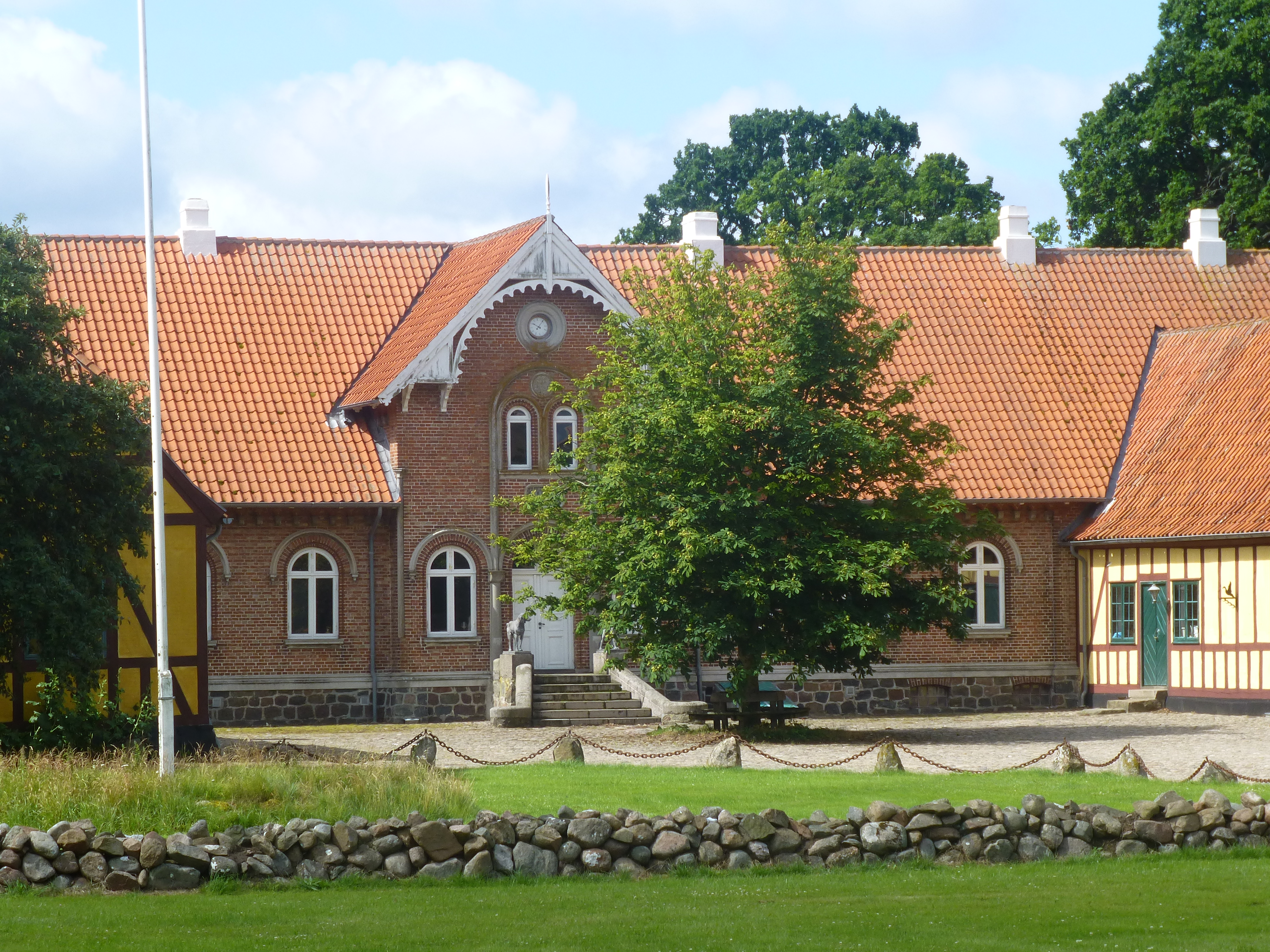 Hovedbygningen på Rolsøgaard set fra nord